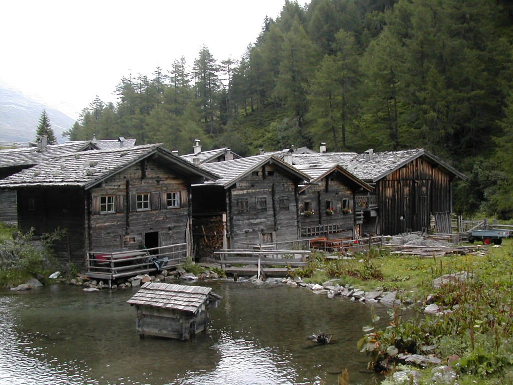 Almen im Aussergschlöss